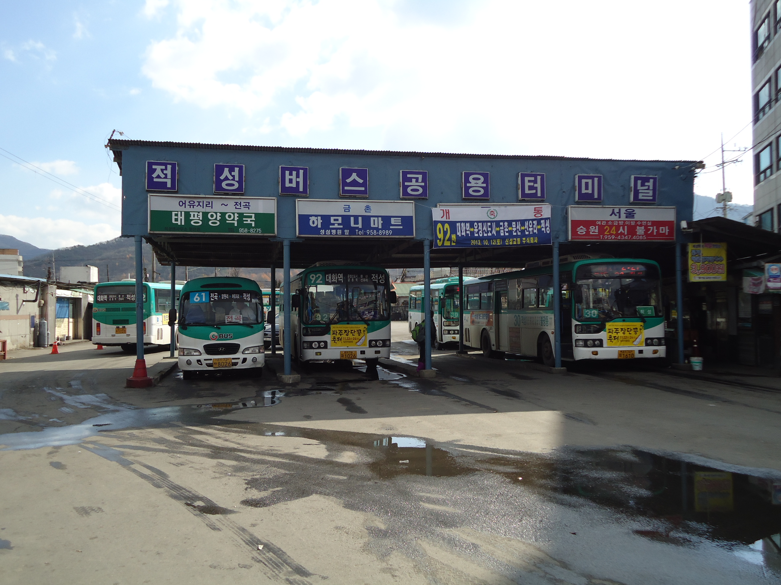 경기도 파주시 적성면에 위치한 적성시외버스터미널입니다.